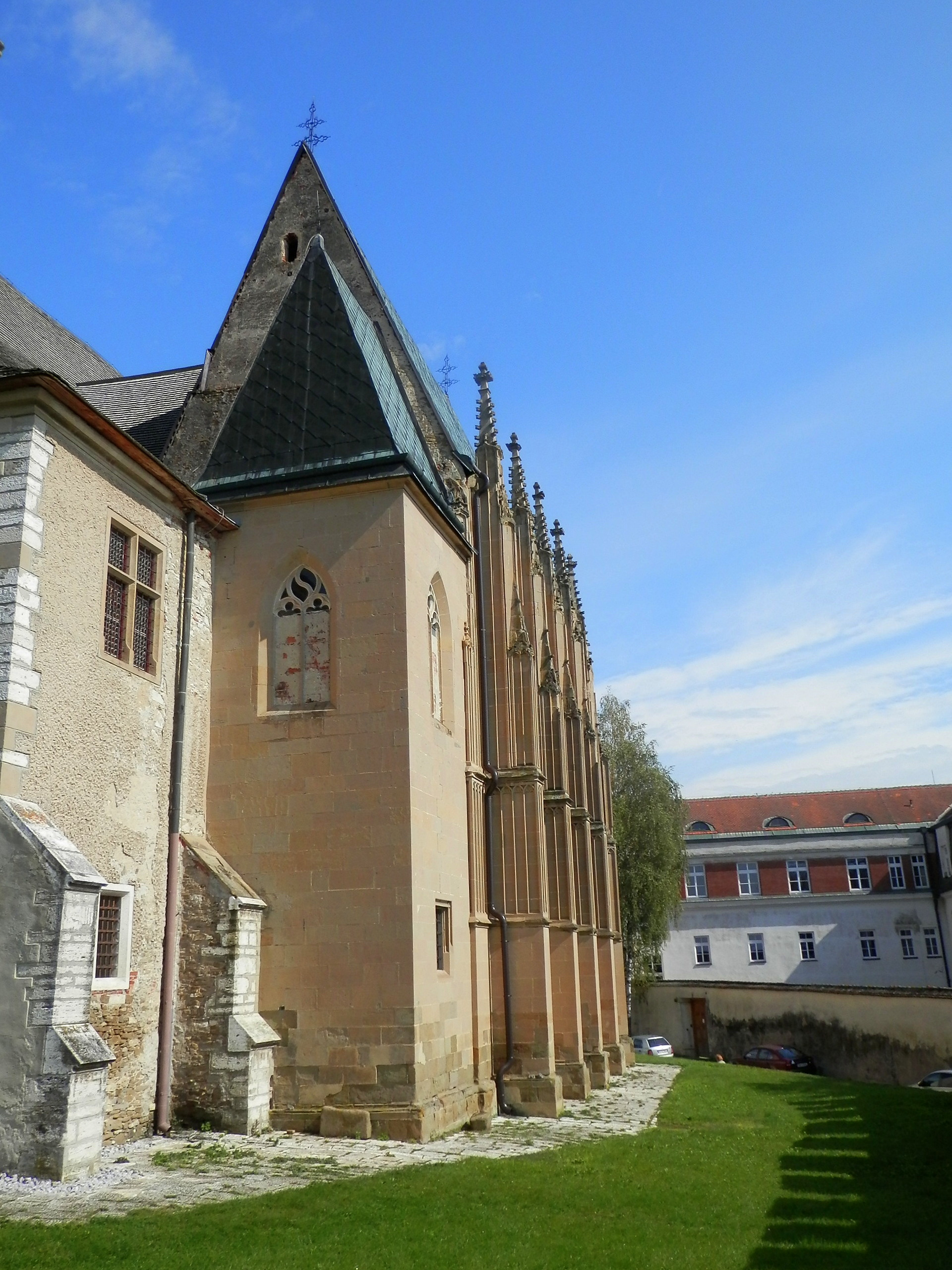 Pôvodne románska katedrála svätého Martina z roku 1200, Spišská Kapitula-Spišské Podhradie, okres Levoča. Južná časť katedrály s kaplnkou Zápoľovcov.